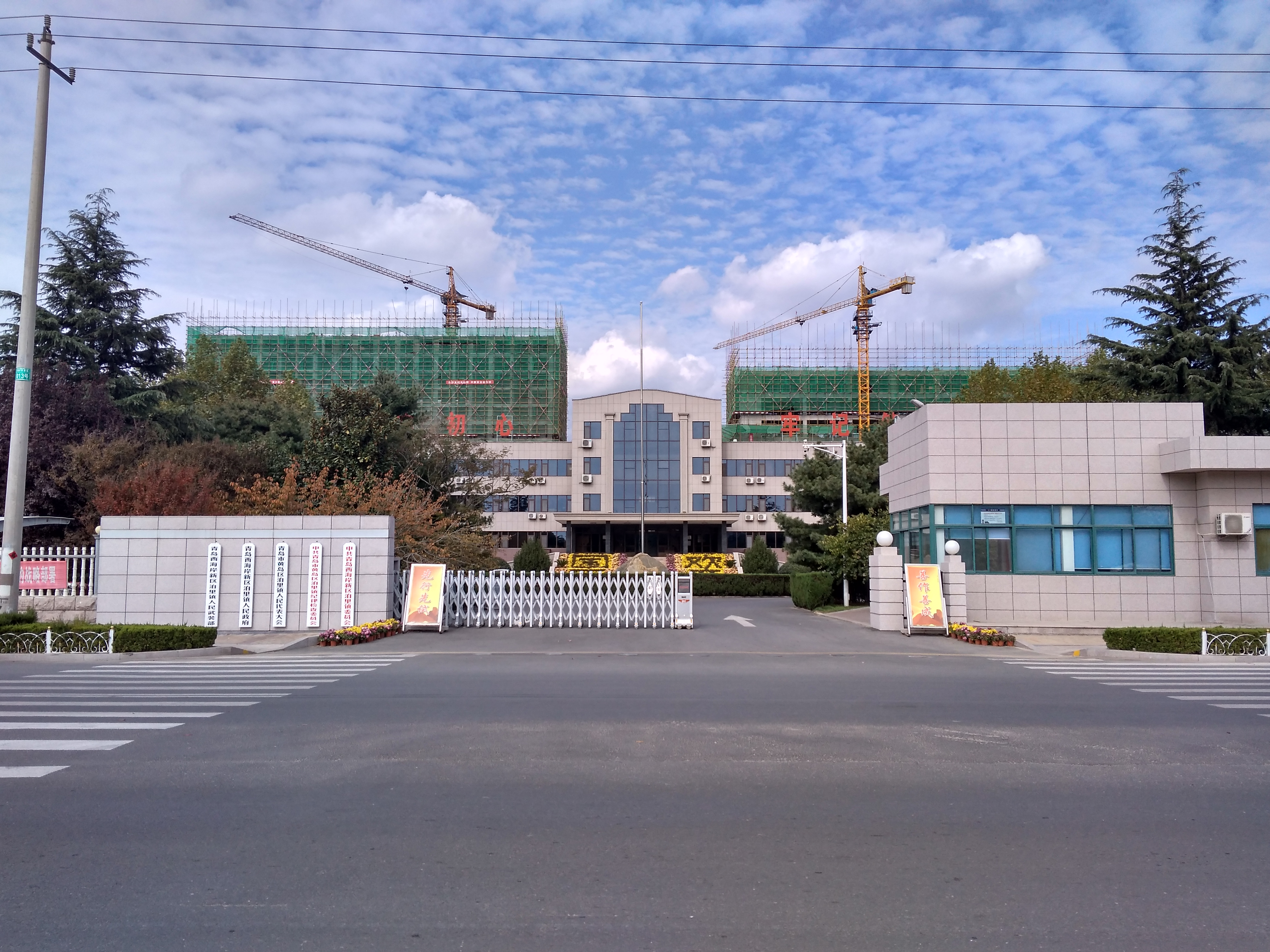 青岛市西海岸新区泊里镇人民政府